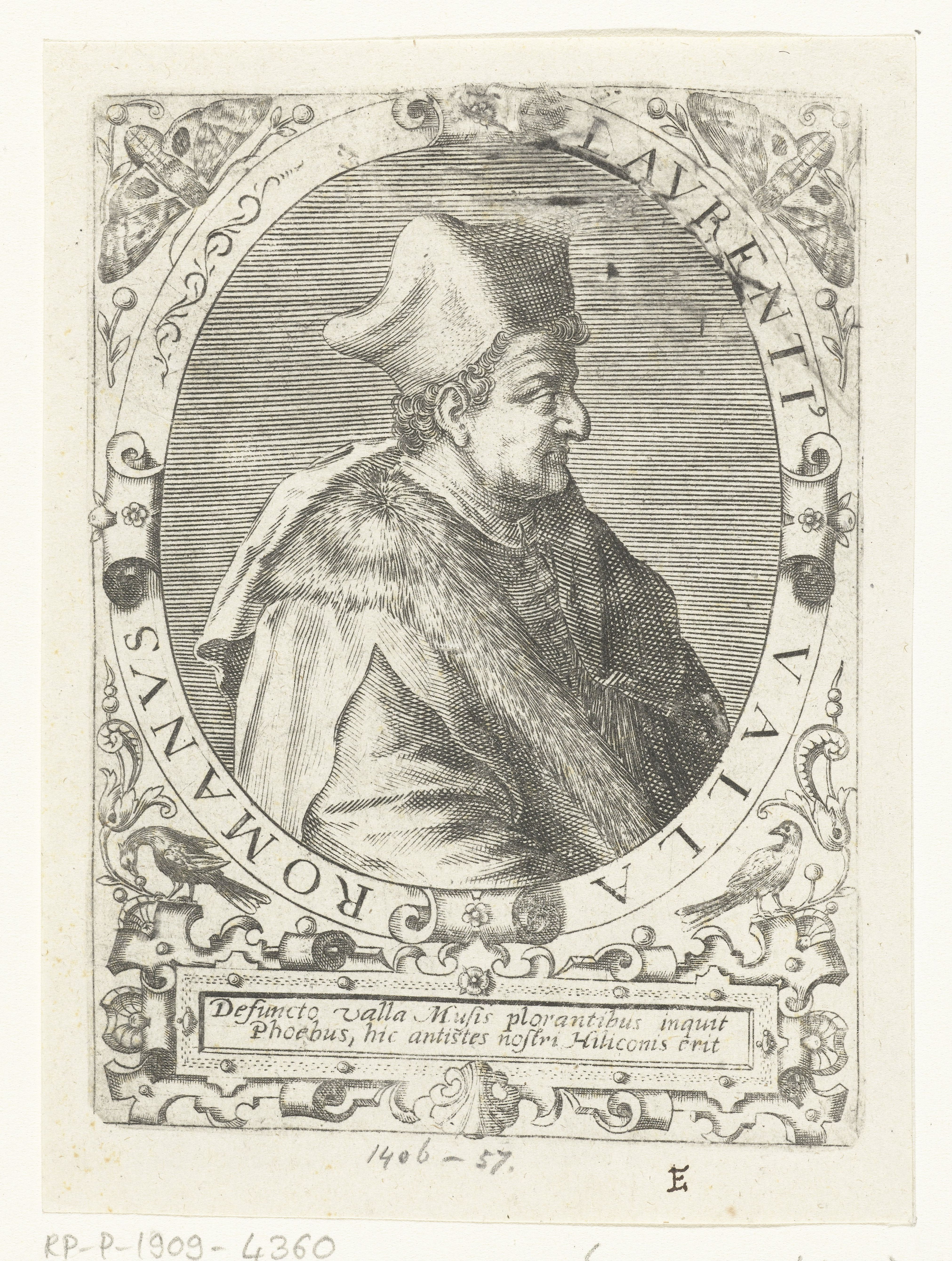 IdentificatieTitel(s): Portret van Lorenzo VallaLaurentius Valla (titel op object)Objecttype: prent boekillustratie Objectnummer: RP-P-1909-4360Catalogusreferentie: Singer 92332Opschriften / Merken: verzamelaarsmerk, verso, gestempeld: Lugt 2228Omschrijving: Portret van de humanist Lorenzo Valla, in ovaal met randschrift. Onder het portret een lofdicht.VervaardigingVervaardiger: prentmaker: Theodor de Bryprentmaker: Johann Theodor de Brynaar ontwerp van: Jean Jacques Boissard (mogelijk)Plaats vervaardiging: Frankfurt am MainDatering: ca. 1597 - ca. 1599Fysieke kenmerken: gravureMateriaal: papier Techniek: graveren (drukprocedé)Afmetingen: plaatrand: h 140 mm × b 100 mmToelichtingGemaakt voor: J.J. Boissard, Icones virorum illustrium doctrina &c eruditione praestanti um contines. Frankfurt am Main: de Bry, 1597-1599.OnderwerpWie: Lorenzo VallaVerwerving en rechtenVerwerving: aankoop 1905Copyright: Publiek domein